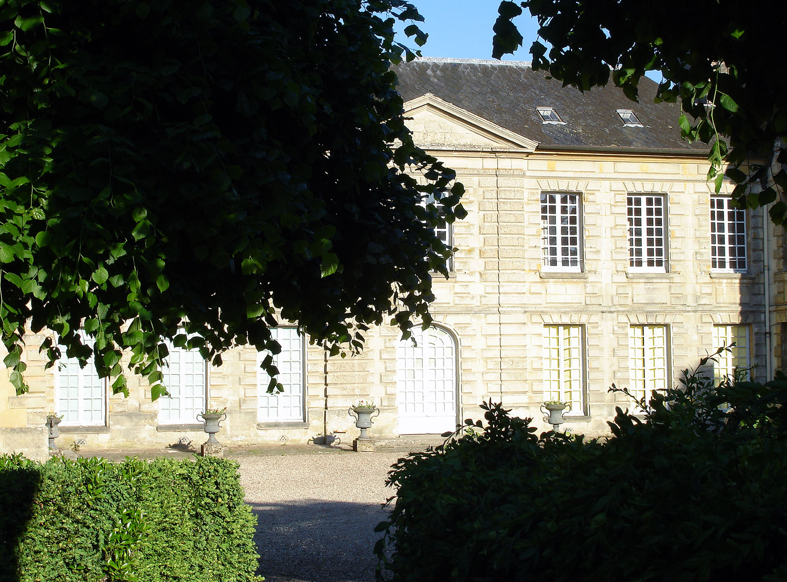 Le château de Gadancourt, Val-d'Oise, France.